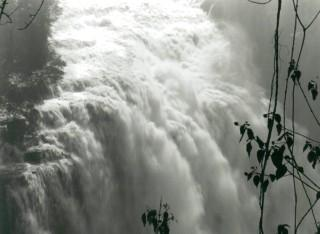 Victoria Falls